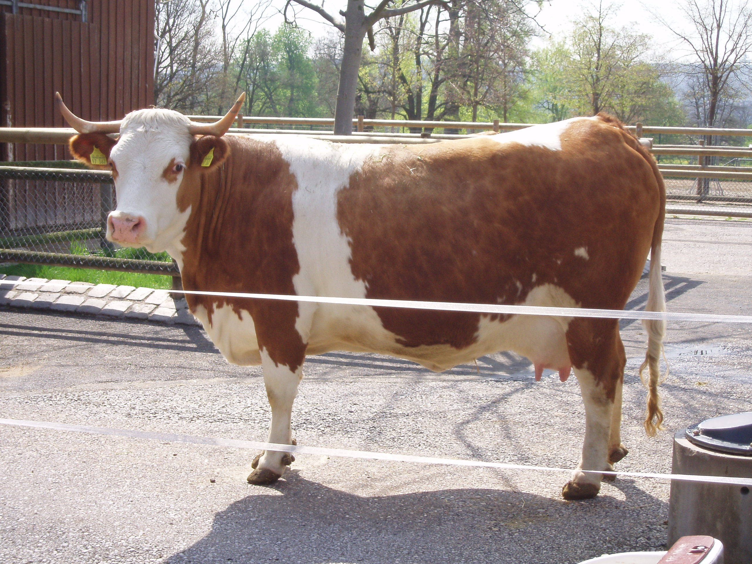 Hinterwälder Rind